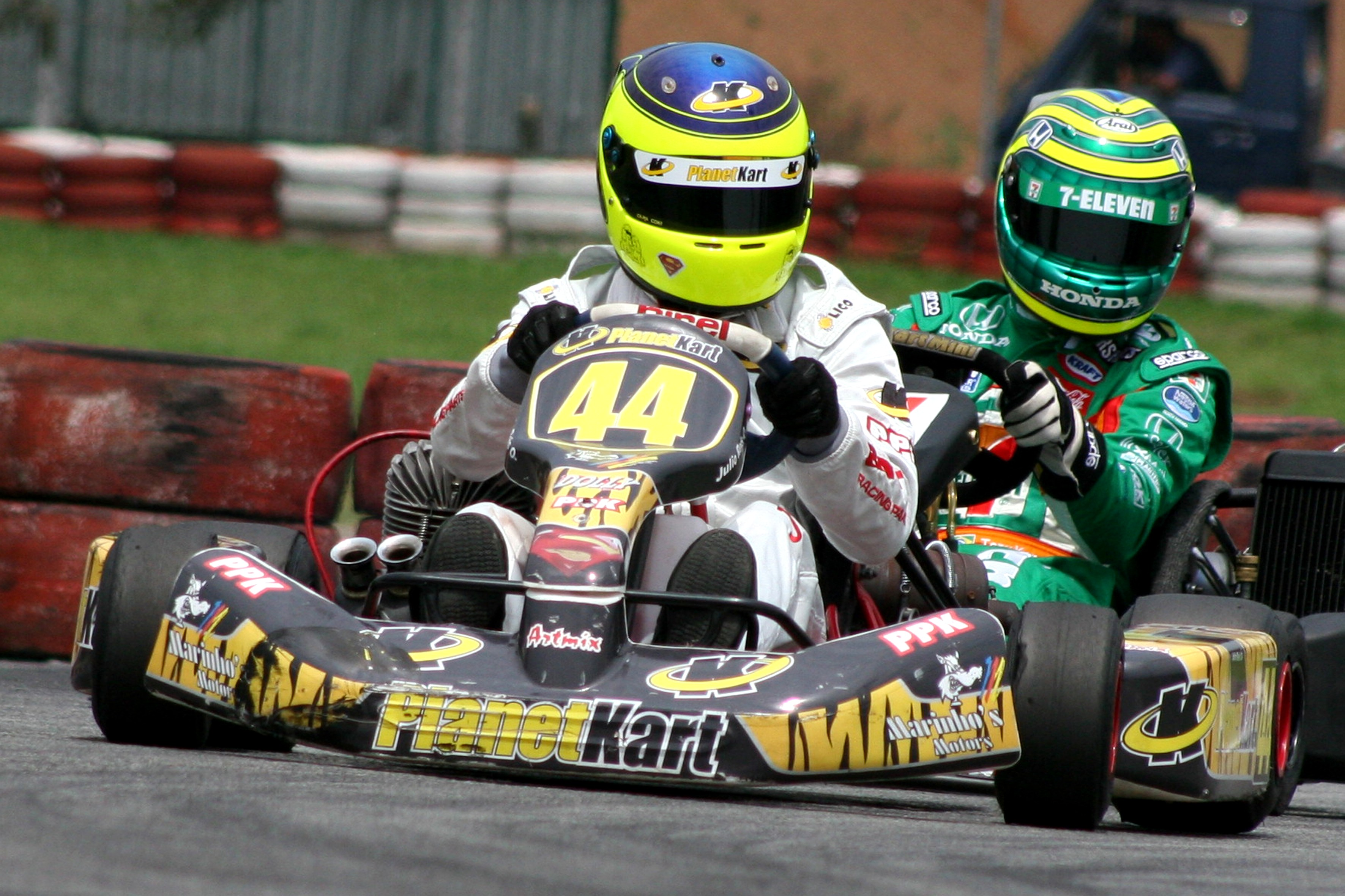 Race kart in Granja Viana